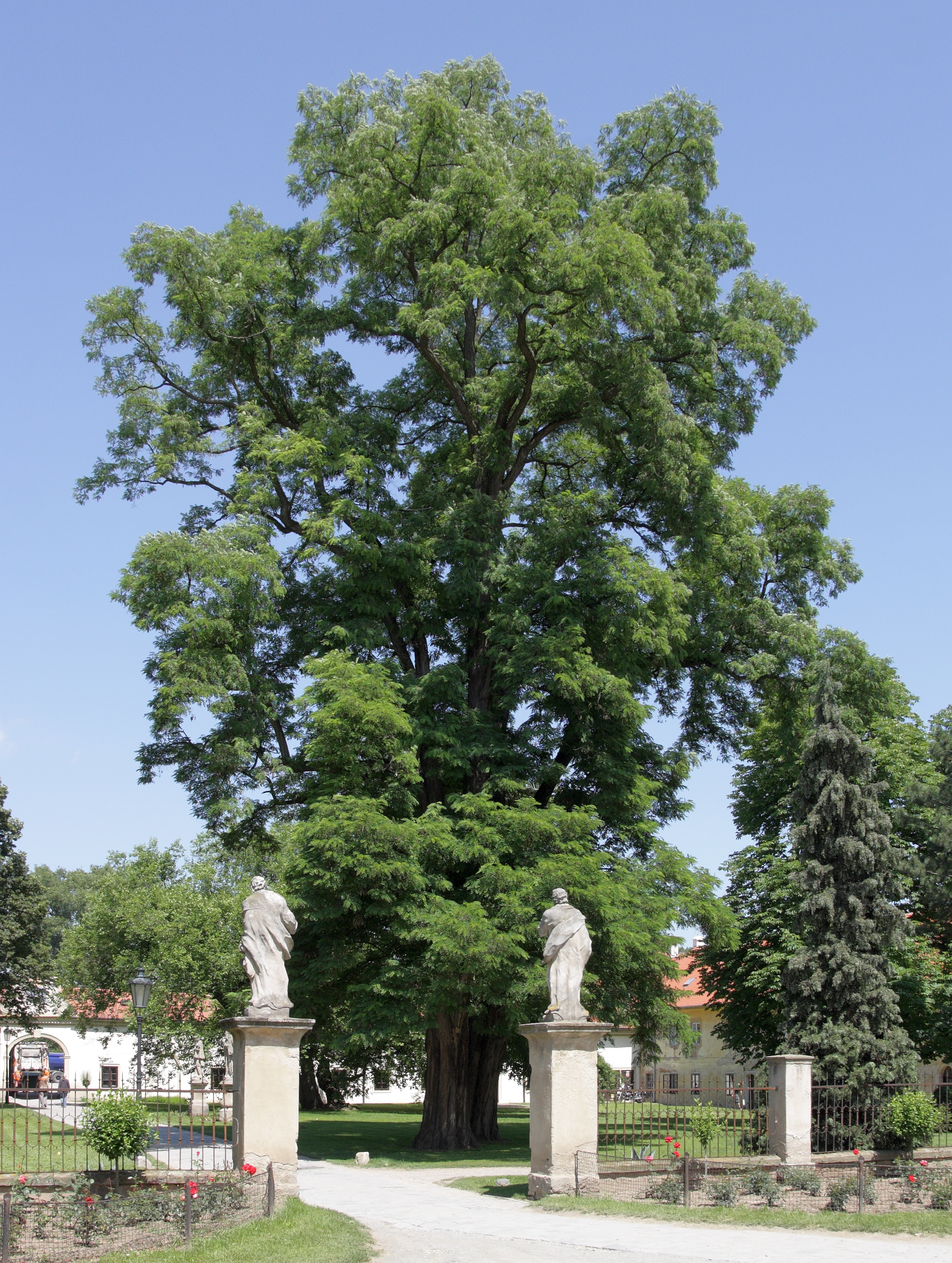 Rajhrad - Benediktinský klášter - akát.